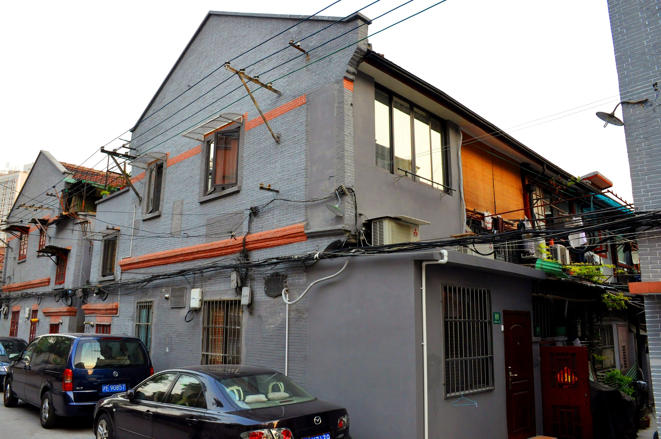 中文（中国大陆）: 郭沫若多伦路旧居 多伦路201弄89号